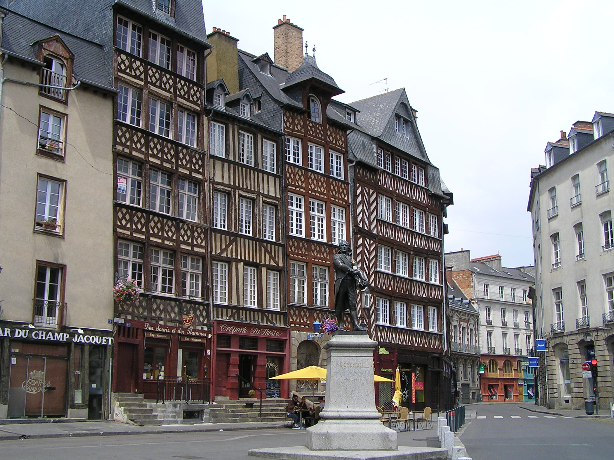 maison médiévale, Place du Champ-Jacquet à Rennes et statue de Jean Leperdit